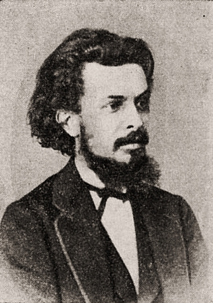 Vasilij Filippovič Troščanskij